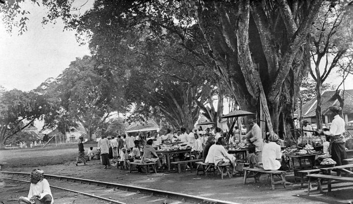 Repronegatief. Middageten op het plein te Malang, Java